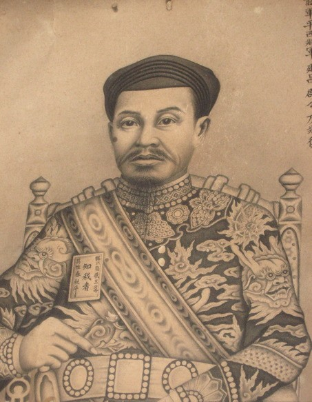 Tranh thờ Nguyễn Huỳnh Đức (1748 - 1819), một danh tướng và là khai quốc công thần nhà Nguyễn.